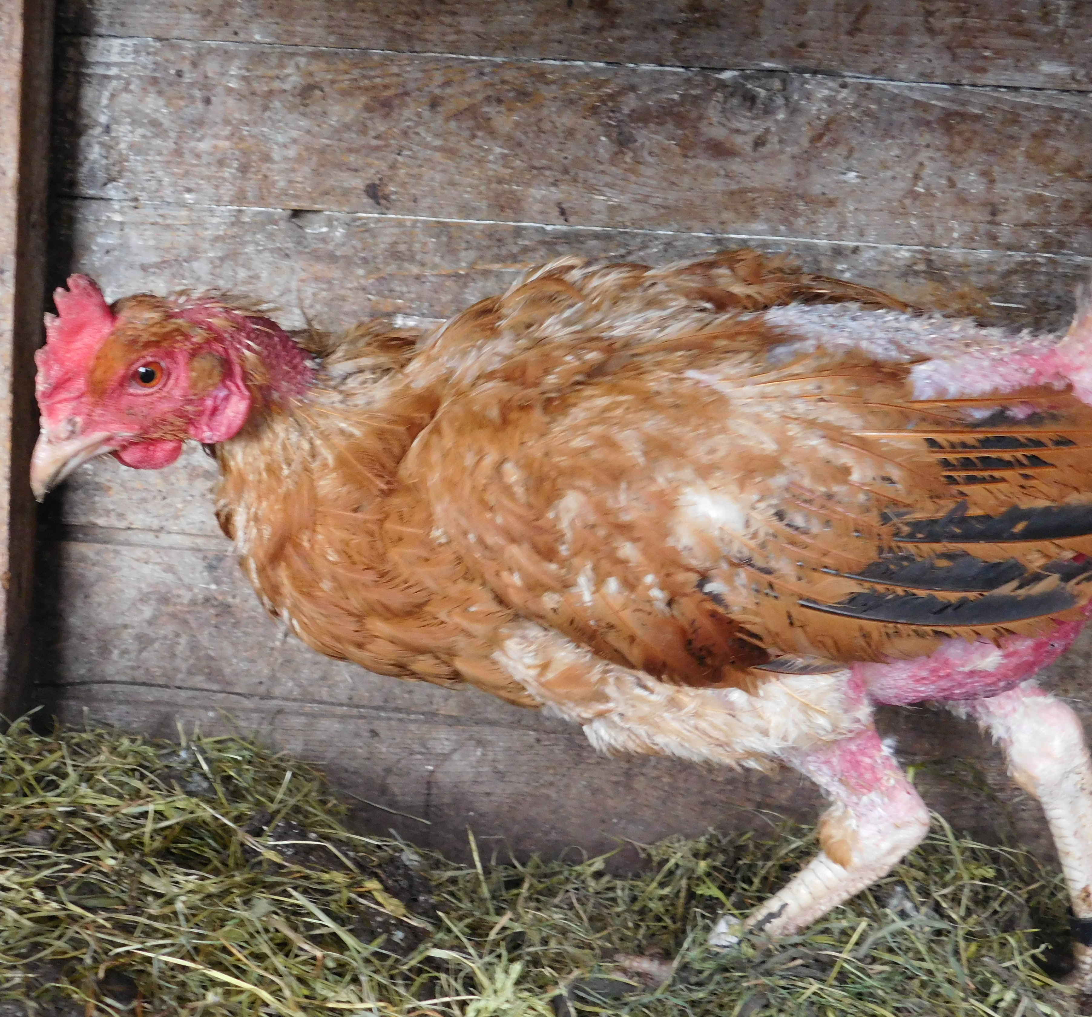 Dominant D853